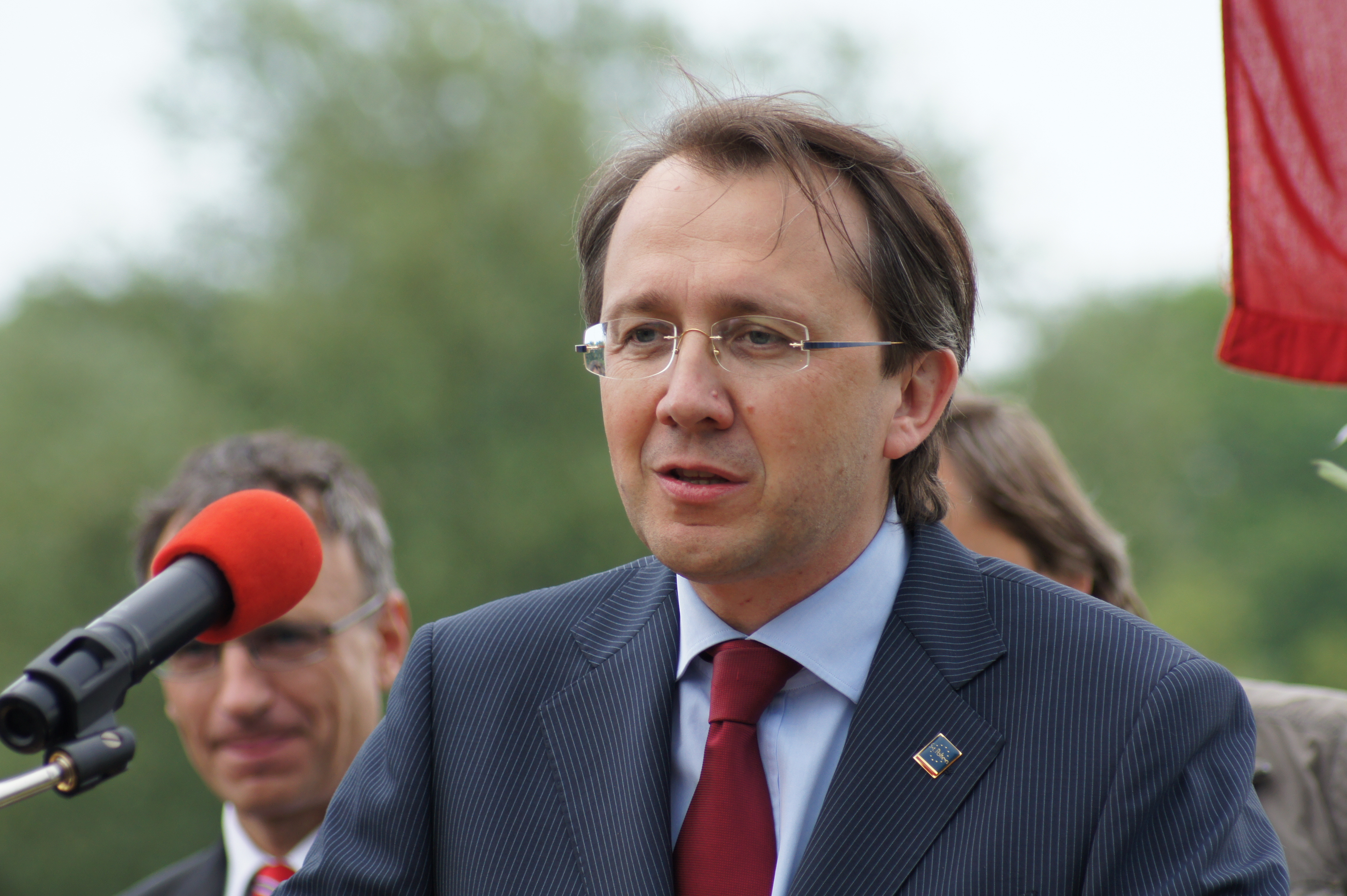 Der Bürgermeister der Stadt St. Pölten Matthias Stadler bei der Eröffnung des neuen Stattersdorfer Steges, genannt "Lions Steg"